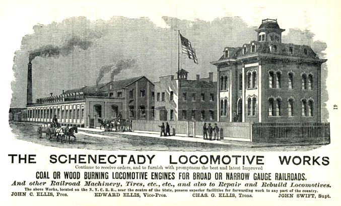 Advertisement